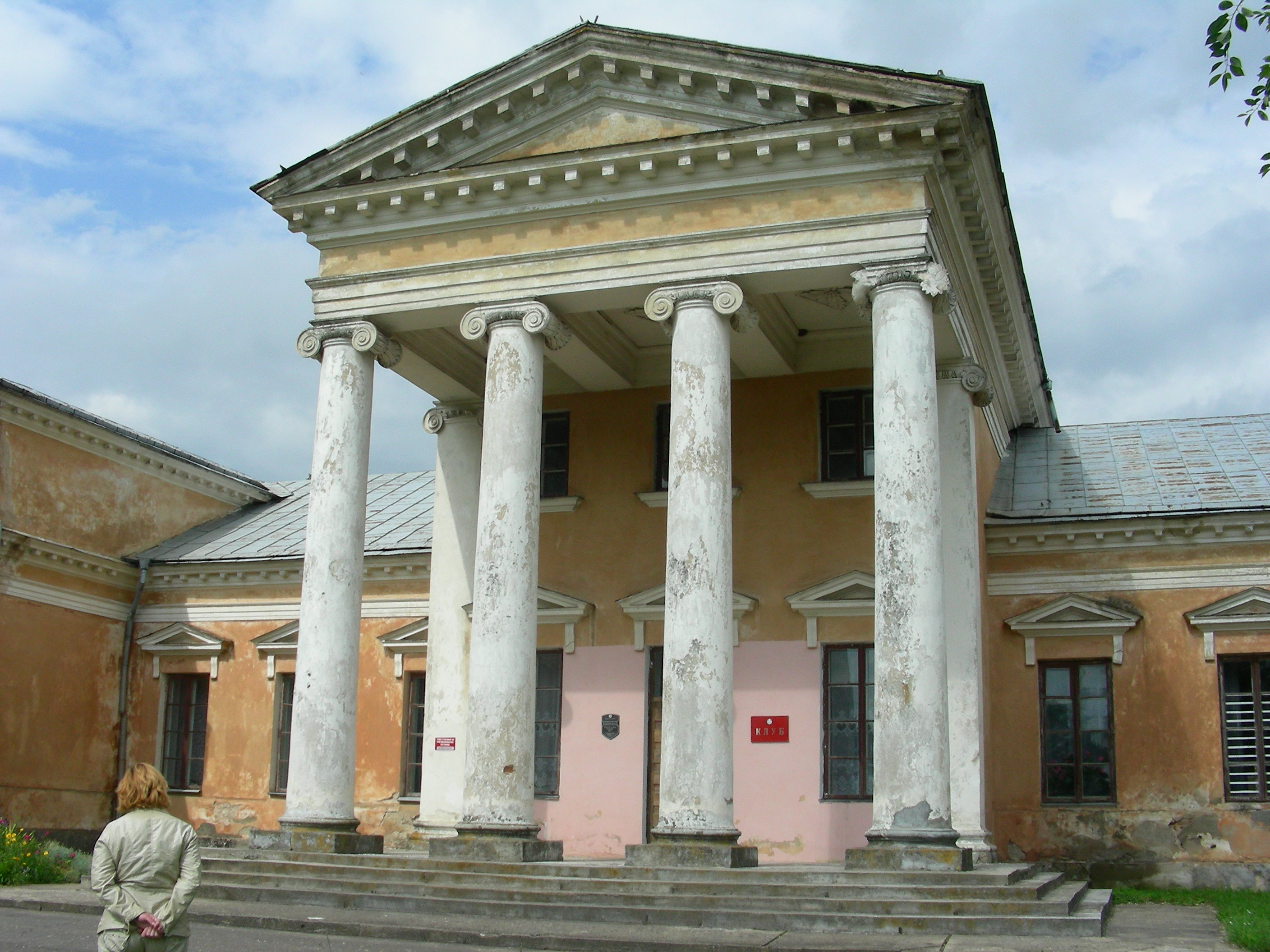 Беларуская (тарашкевіца): Былы палацава-паркавы ансамбль:палацпарк. в. Сноў This is a photo of Belarusian heritage monument. Reference number: 612Г000500 ( WLM)